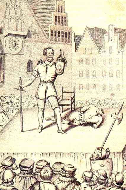 Die Enthauptung des gewesenen Breslauer Ratsherren, Schöffen und Obmannes Heinz Dompnig d. J. (um 1435-1490) am 5. Juli 1490 in Breslau.